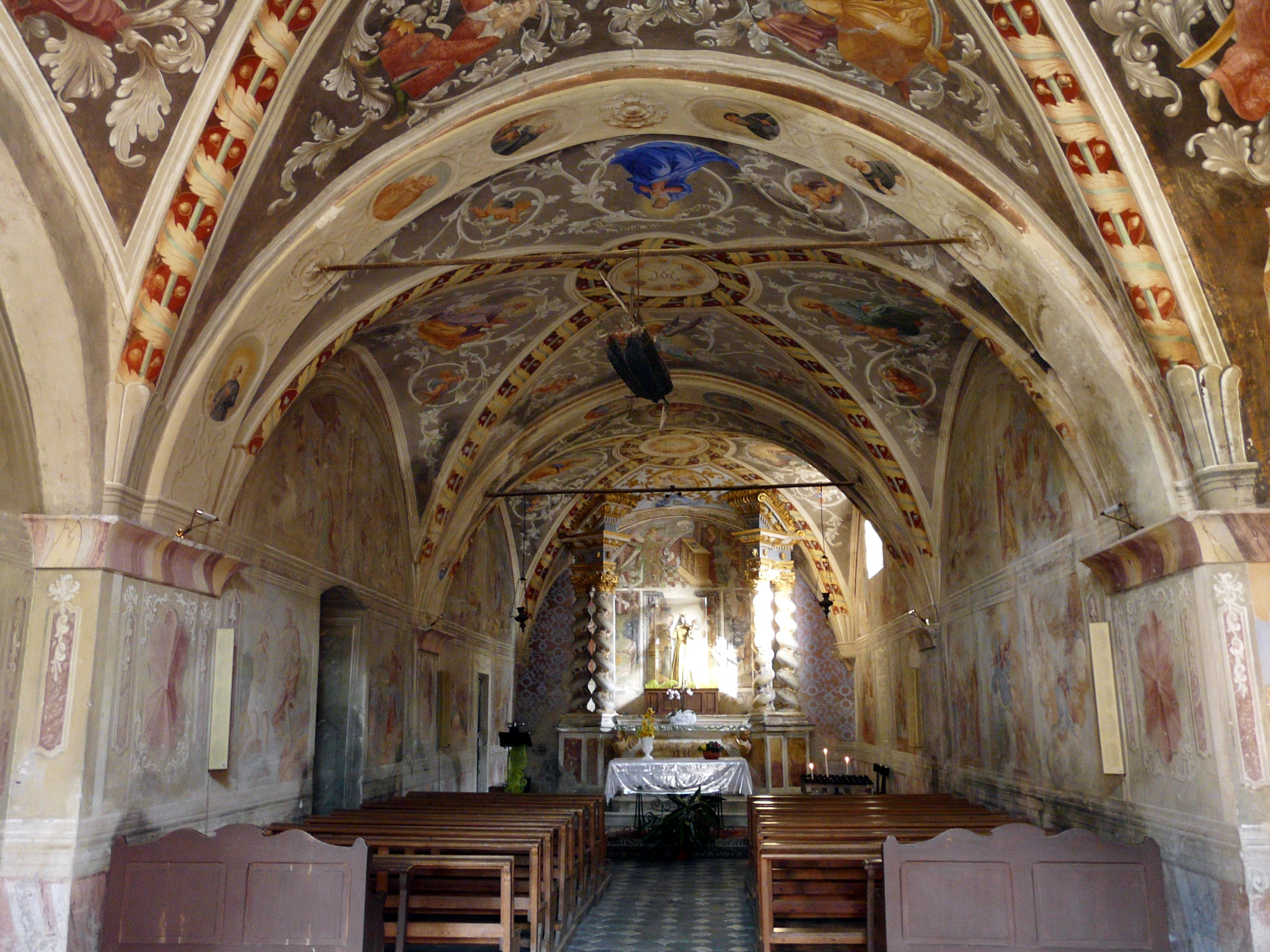 Affreschi del Santuario di Nostra Signora delle Grazie, Isolabona, Liguria, Italia